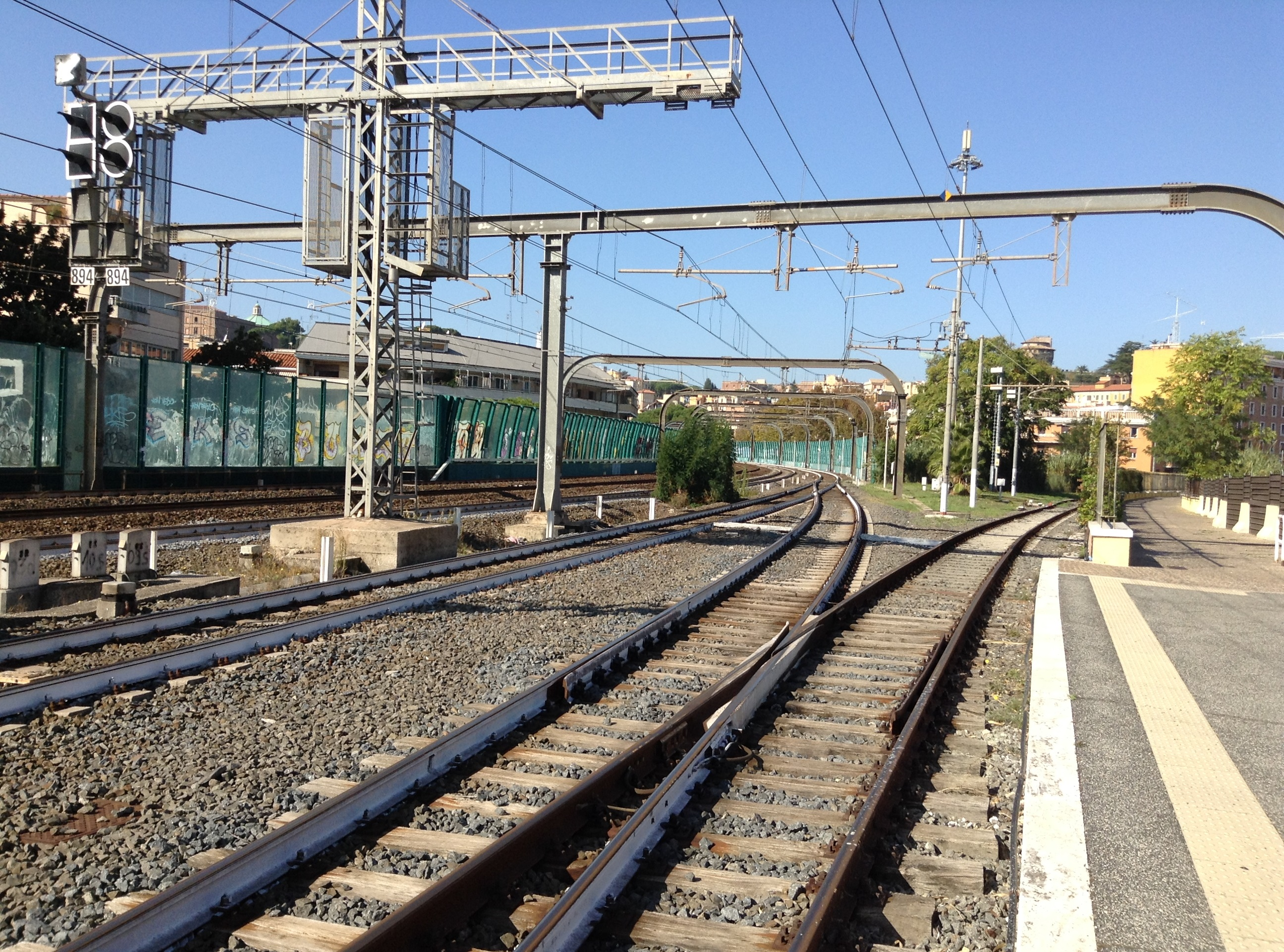 Die nördlichen Ausfahrgleise des Bahnhofs Roma-San-Pietro. Am rechten Bildrand zweigt das Anschlussgleis in den Vatikan von der Hauptstrecke ab.